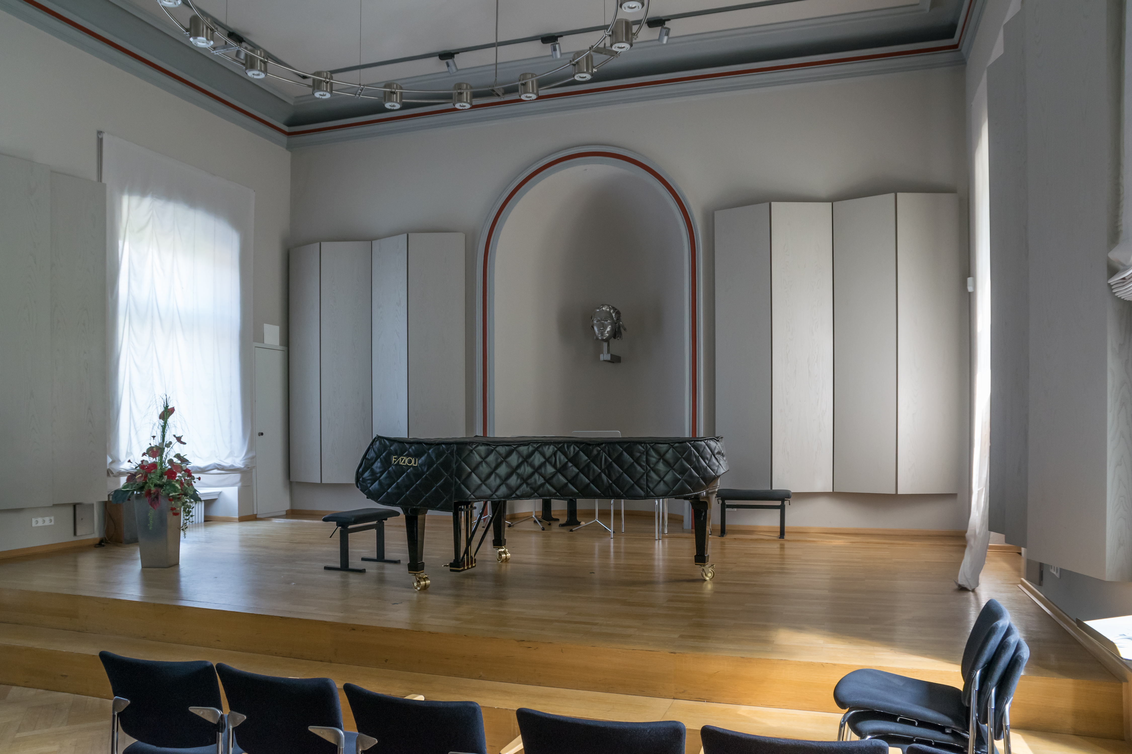 Brahms-Saal im Neuen Palais, heute Hochschule für Musik, in Detmold